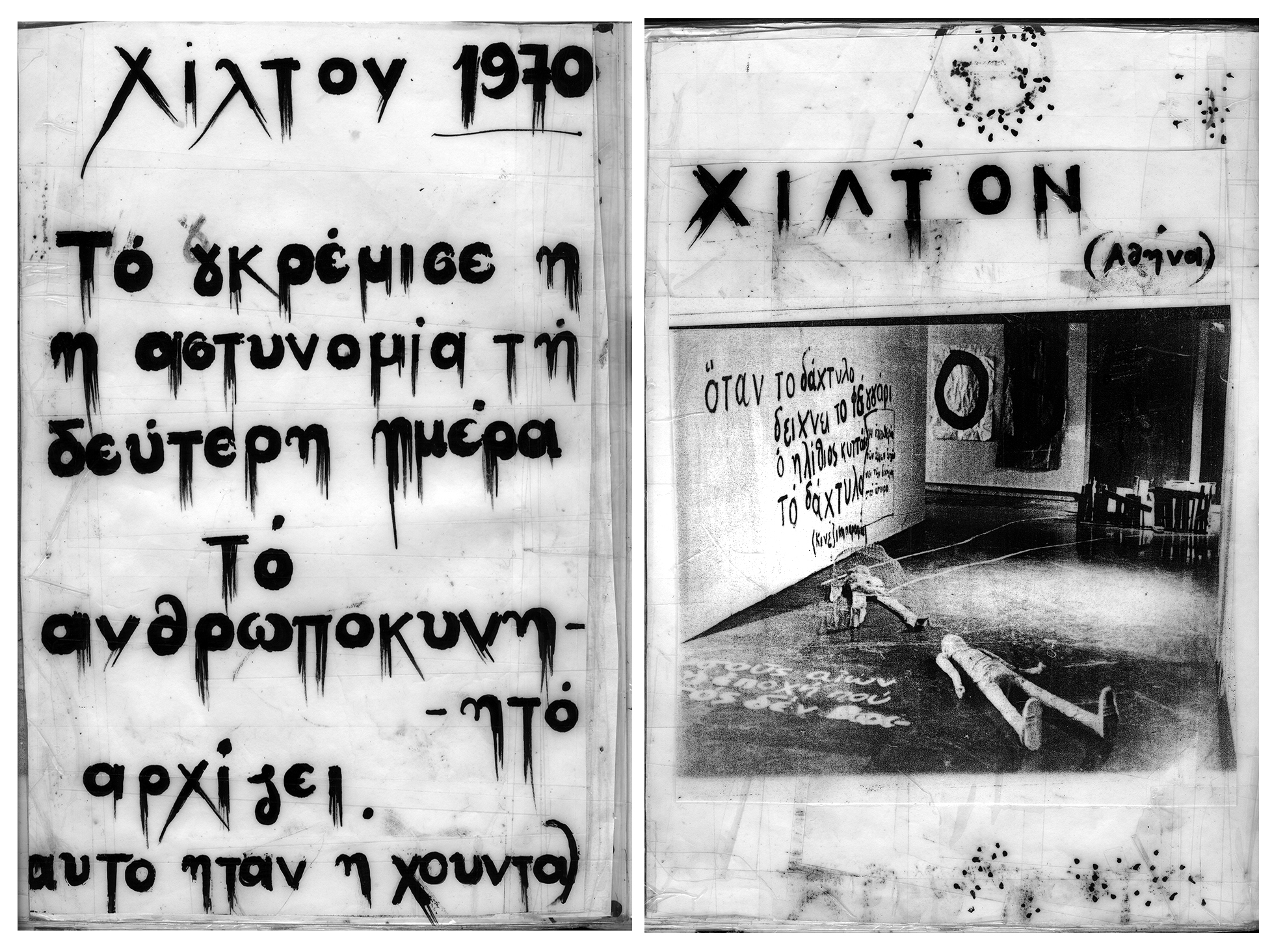 Μαρία Καραβέλα, χειροποίητο λεύκωμα με αναφορά στη λογοκριμένη έκθεση του 1971